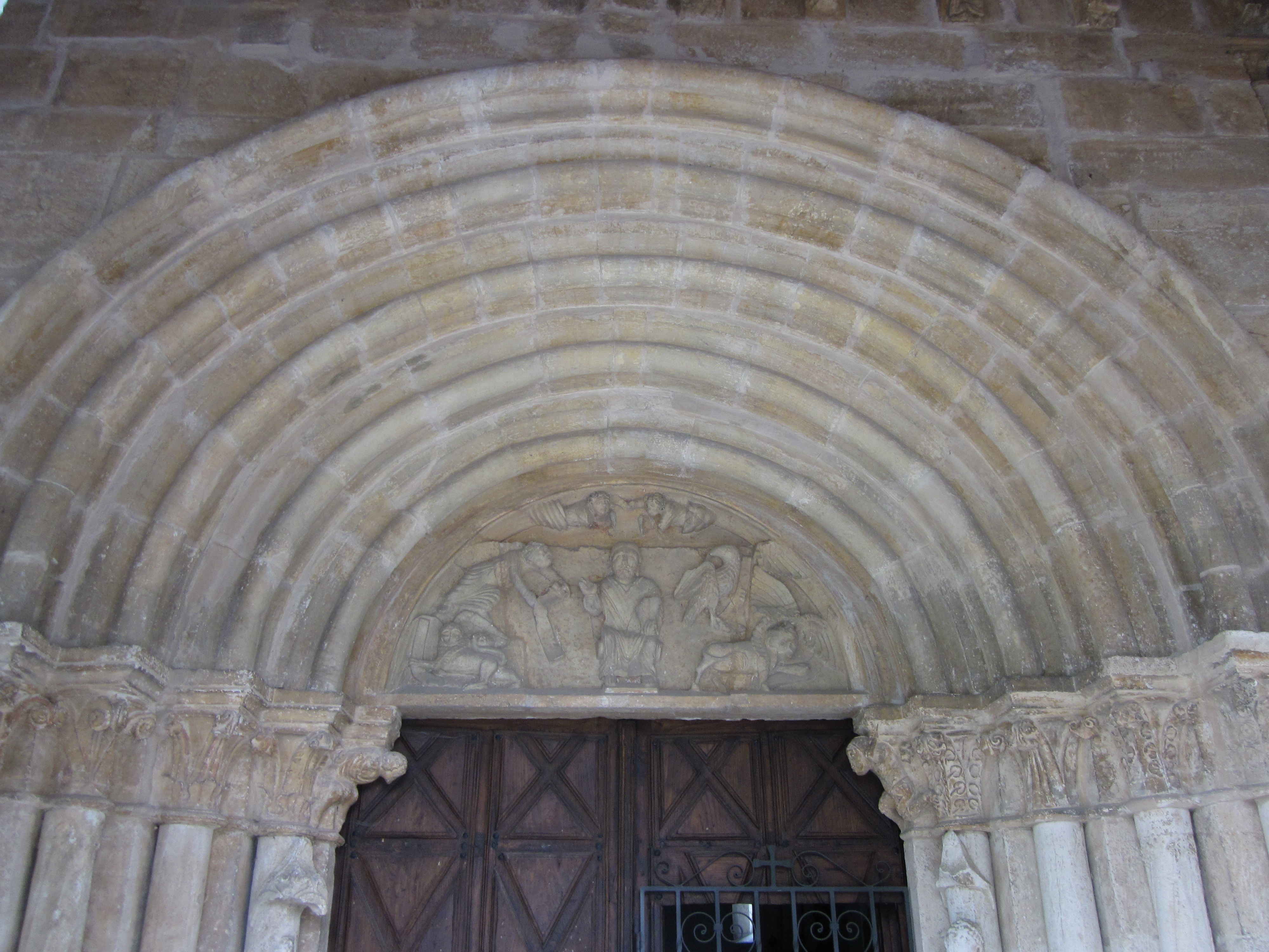 Tímpano de la portada de la Iglesia de San Juan de Priorio, de estilo románico. Las Caldas, Oviedo, Principado de Asturias, España.